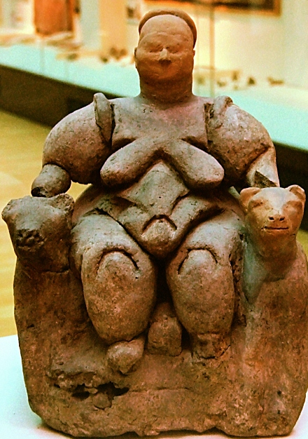 Particolare di questa immagine File:Ankara Muzeum B19-36.jpg